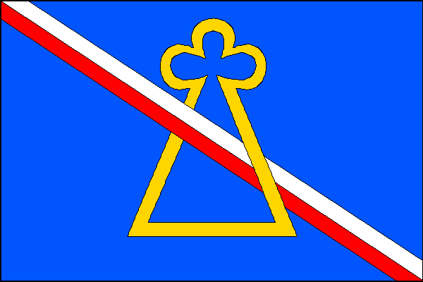 vlajka, Provodovice, okres Přerov